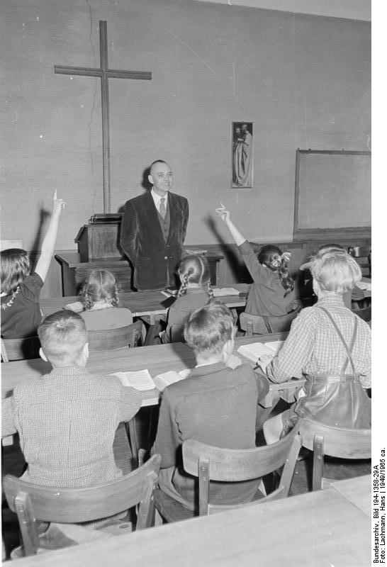 Diaspora. Konfirmandenunterricht